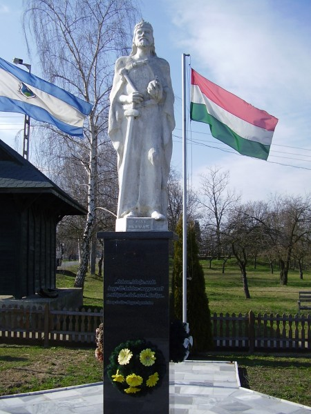 Szent István szobor Őrhalomban. Szpisják Pál (*1961) szobrászművész alkotása (1999)